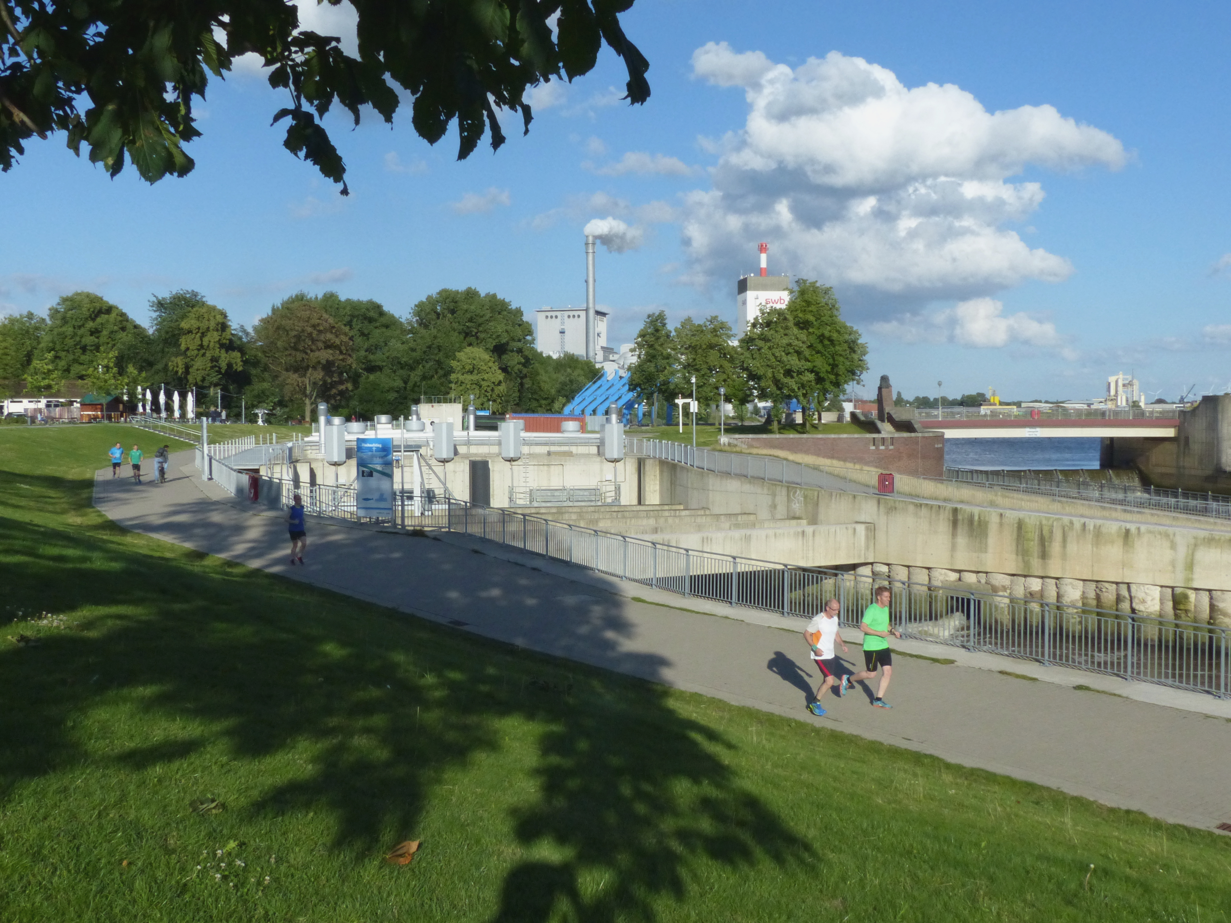 Weserkraftwerk Bremen Auslaufbauwerk